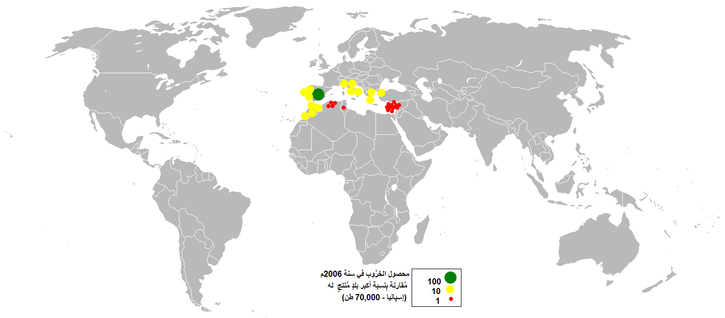 هذه الخريطة الفقاعيَّة تُظهرُ التوزُع العالمي لِمحصول الخرُّوب سنة 2006 مُقارنةً بِنسبة أكبر بلدٍ مُنتجٍ له (إسبانيا - 70,000 طن).